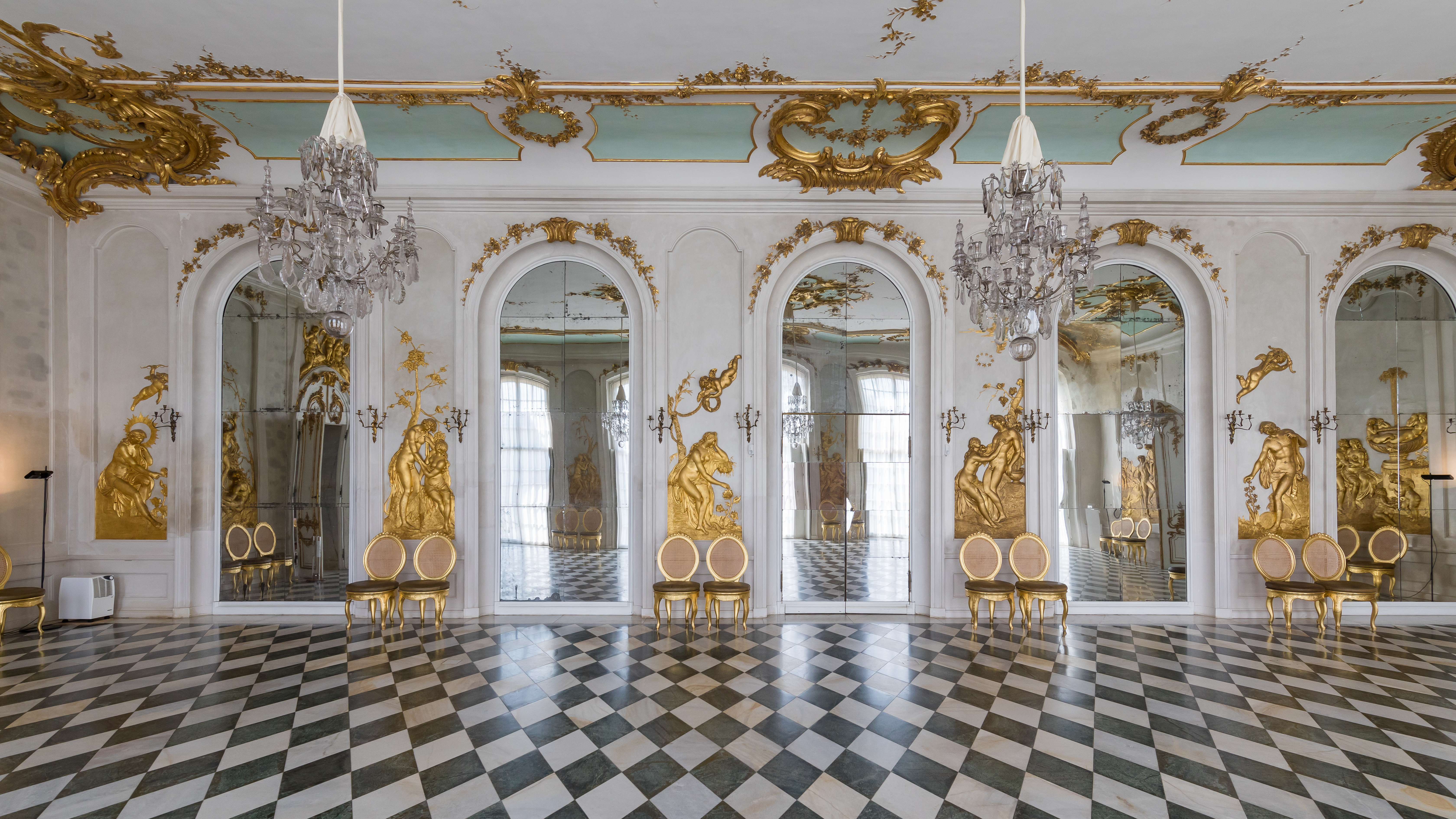 Innenaufnahme, Neue Kammern, Sanssouci, Potsdam